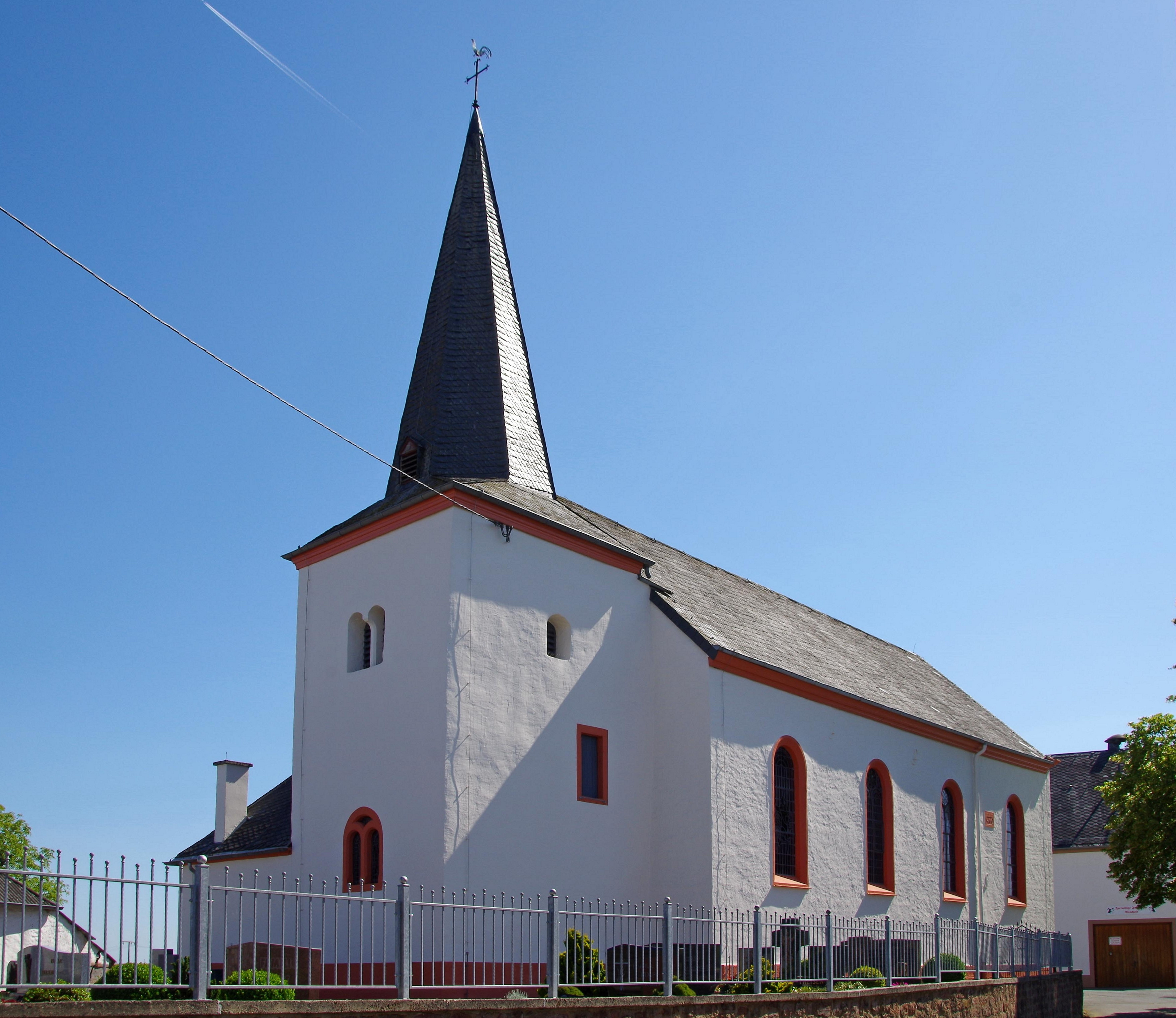 St. Matthias (Altscheid), Nordostseite